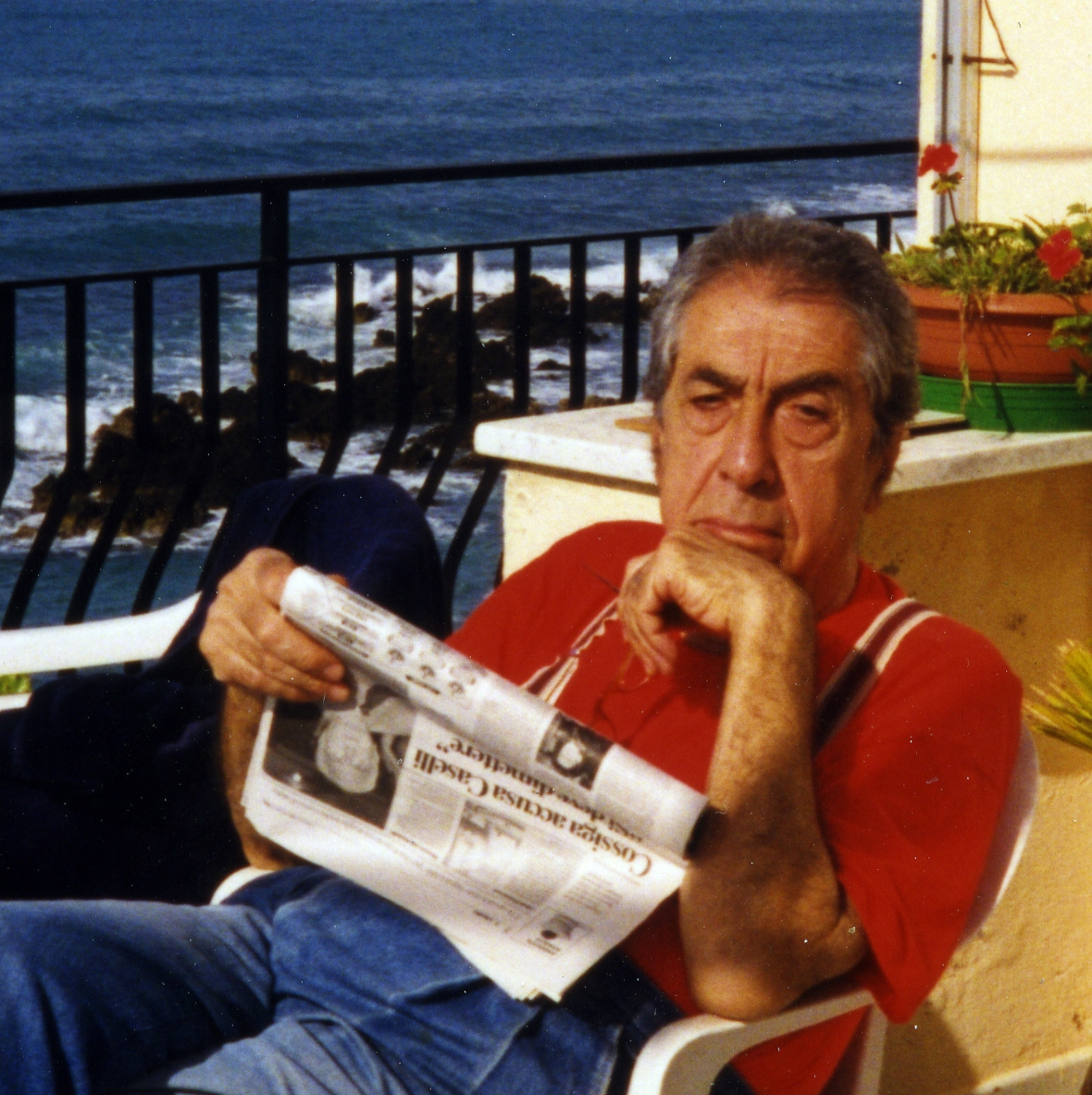 Caio Mario Garrubba sur la terrasse de son appartement à Cirella di Diamante (Calabre/Italie) en mai 2000.